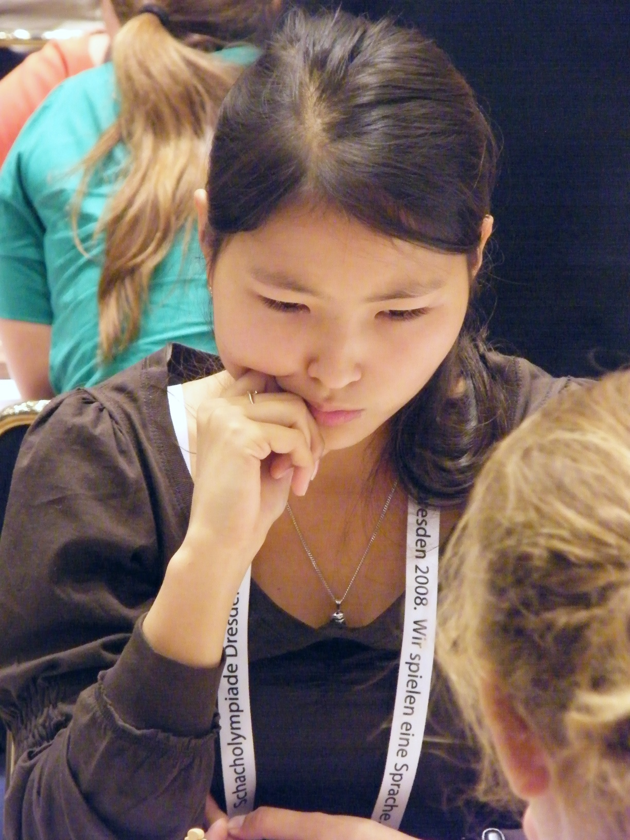 Gulischan Nachbajewa bei der 38. Schacholympiade in Dresden 2008